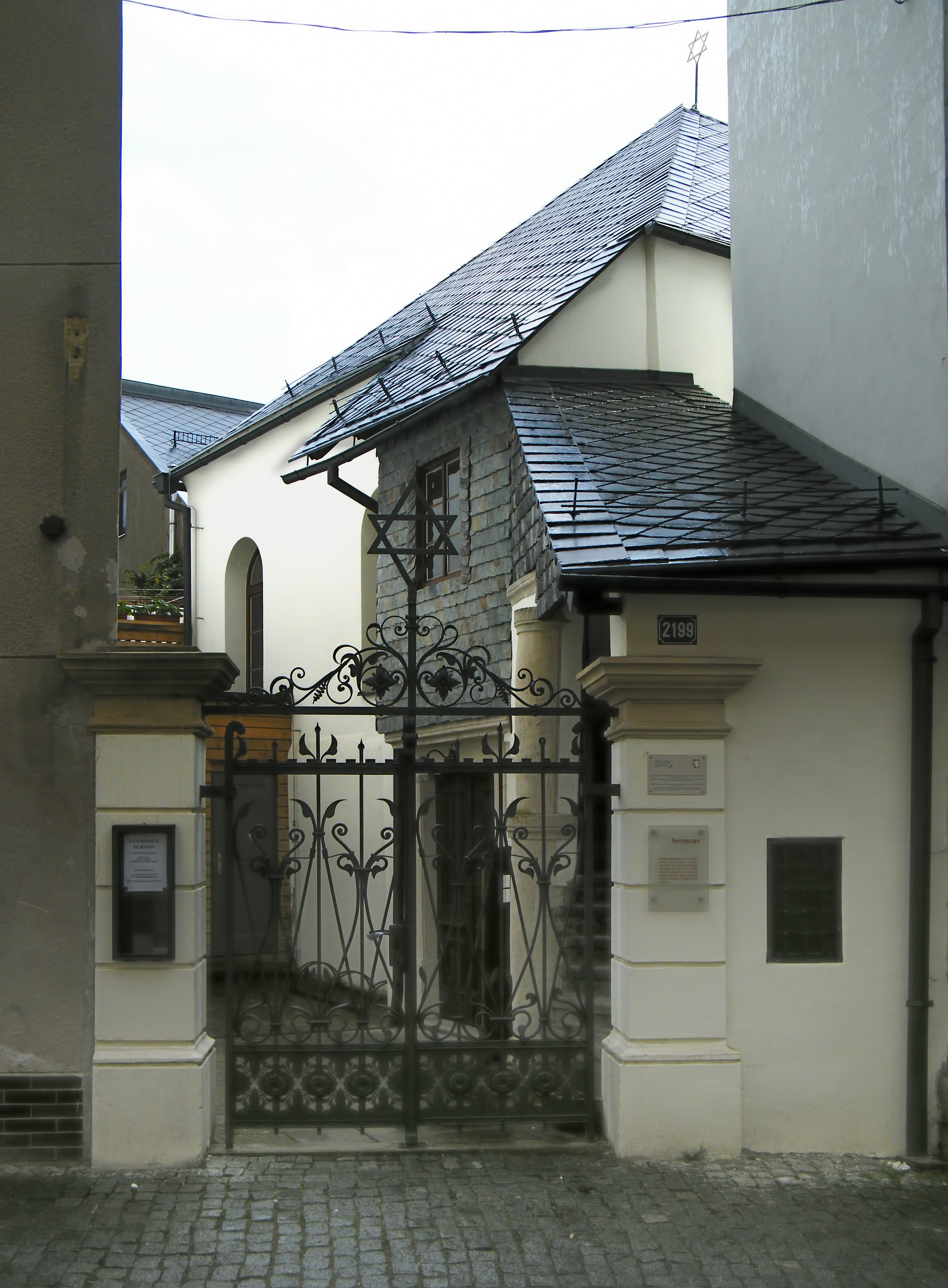 Synagoge in Turnov, Tschechien im April 2011